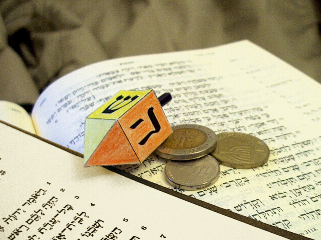 Trenderli, vagyis hanukai pörgettyű